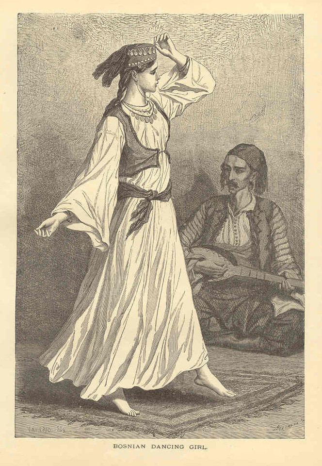 Serbian dancing girl.